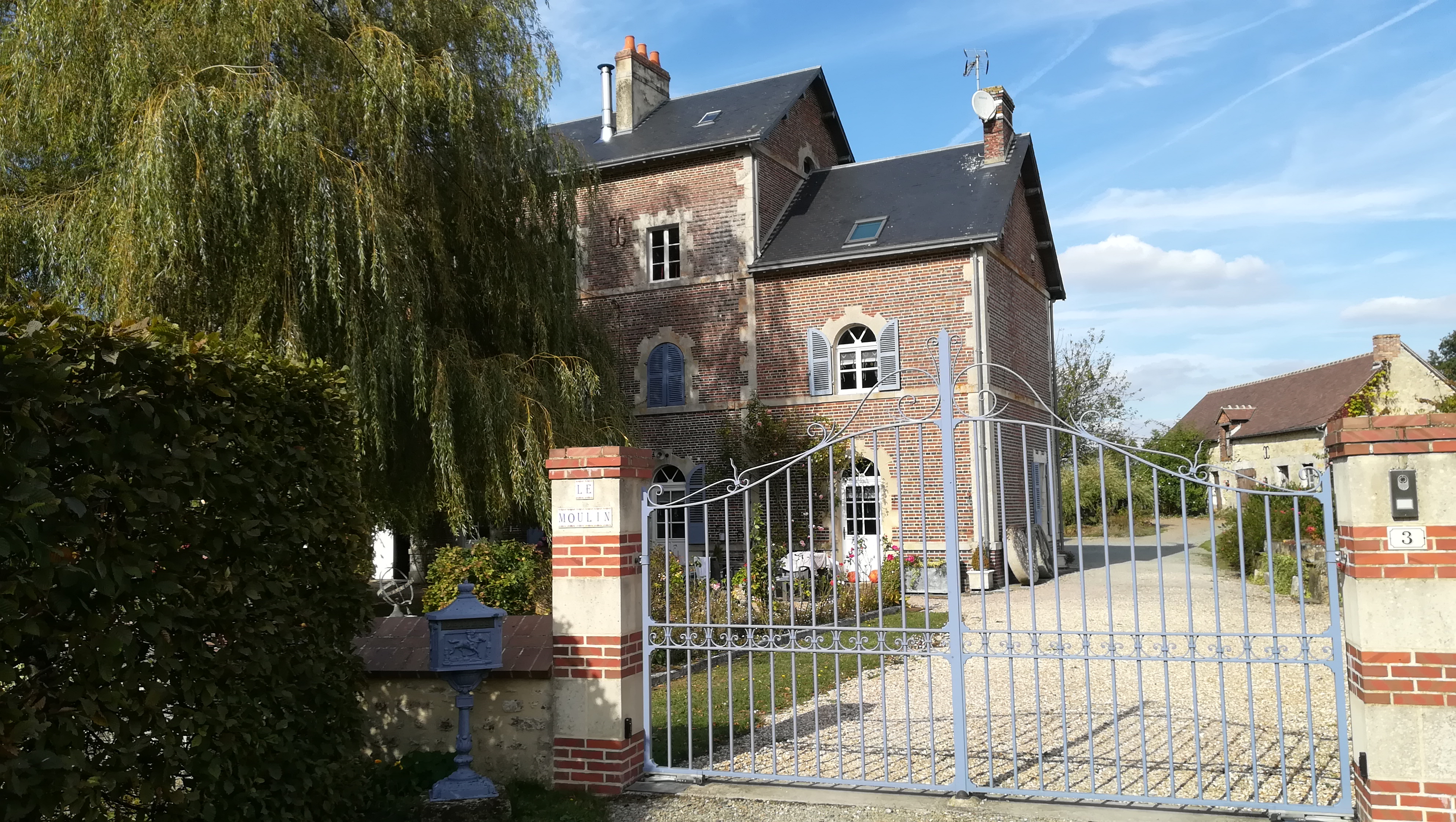 Le Moulin de Buré, classé monument historique. La propriété est privée, le moulin n'est que rarement visitable.